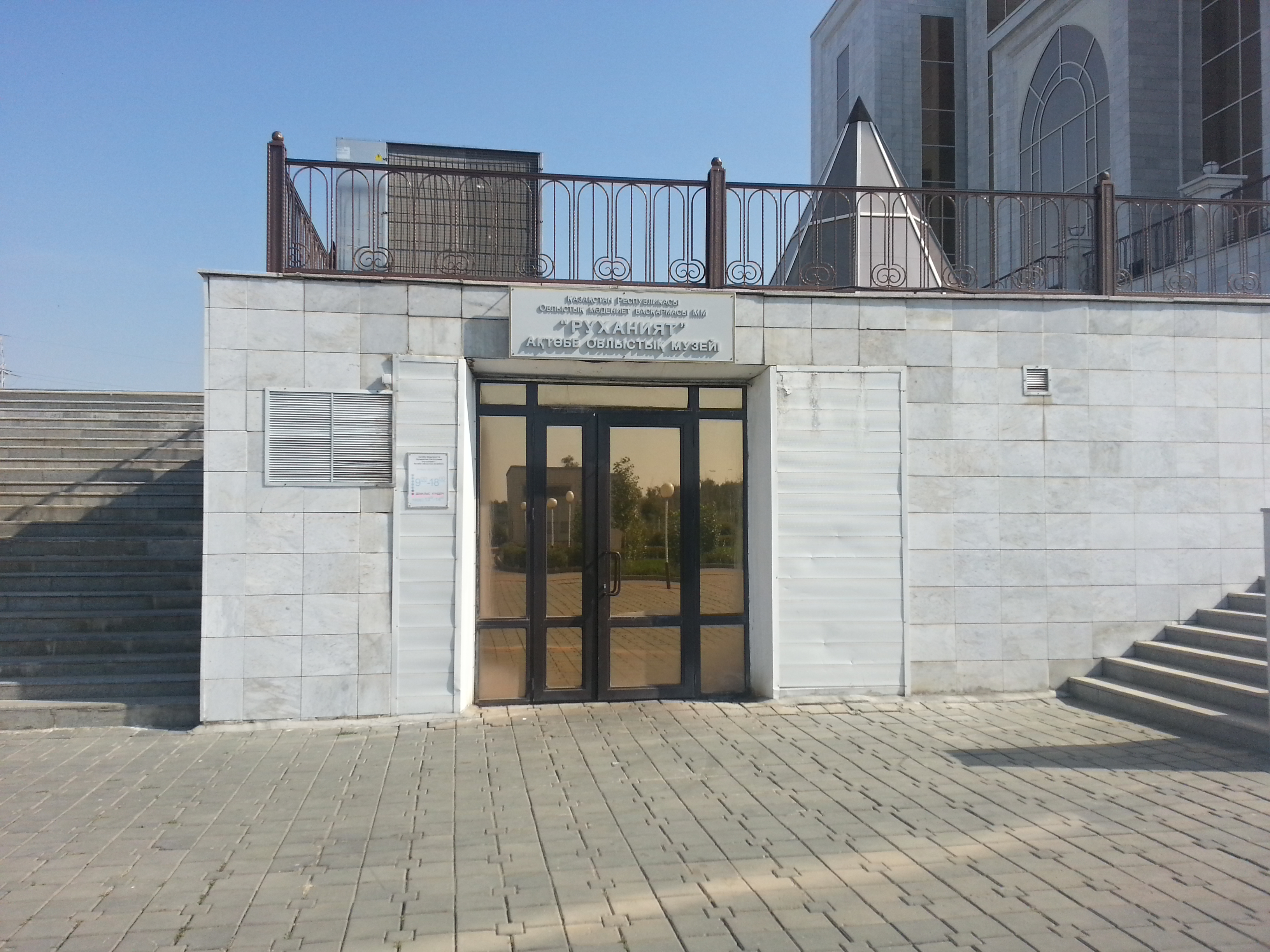 Музей "Руханият", Актобе, Казахстан.